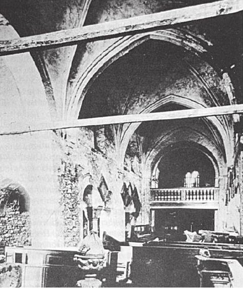 Innenansicht der Georgskirche Aplerbeck